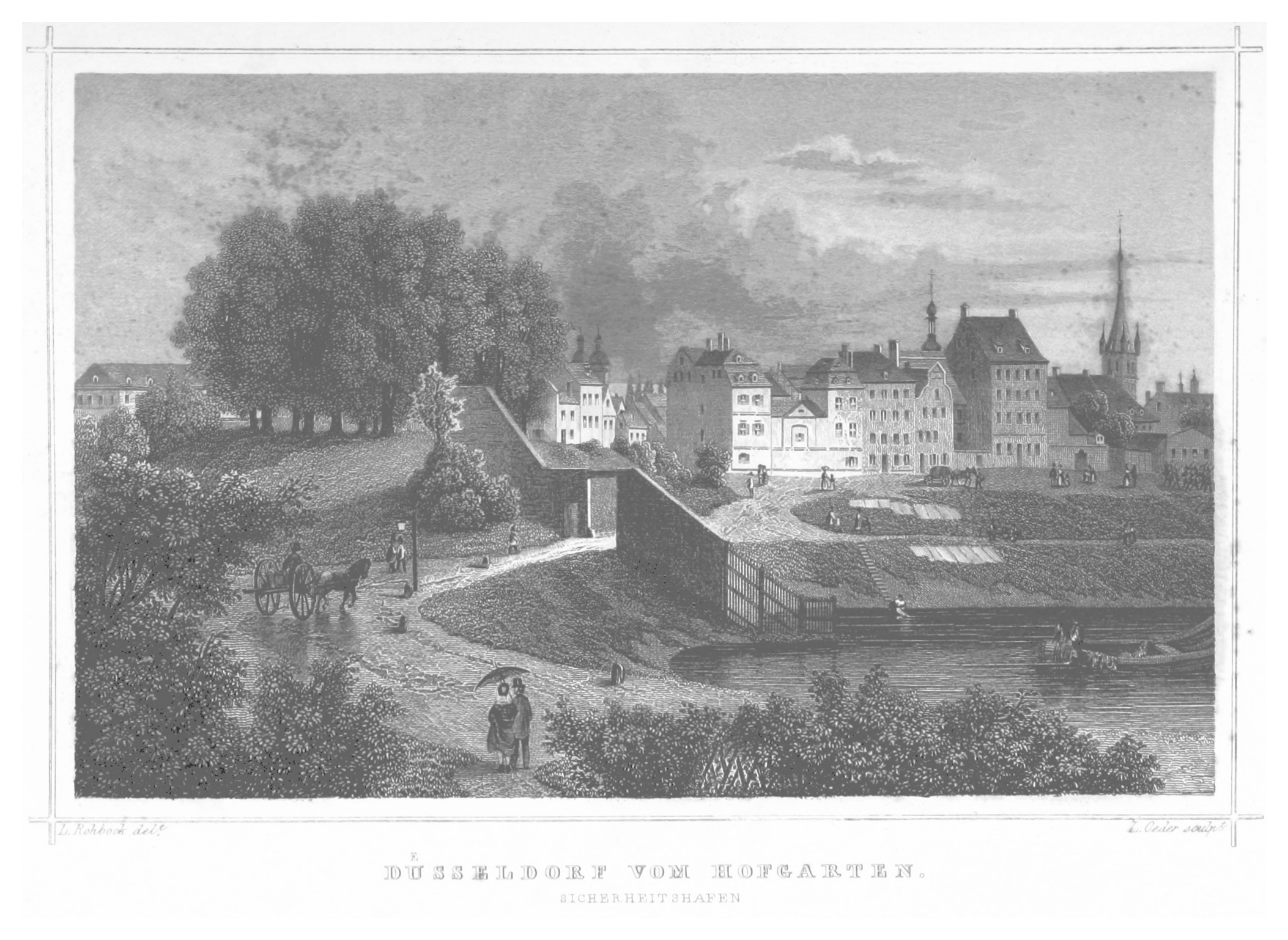 Sicht vom Hofgarten auf den Sicherheitshafen, Hafenwall (Eiskellerstraße) und Eiskellerberg